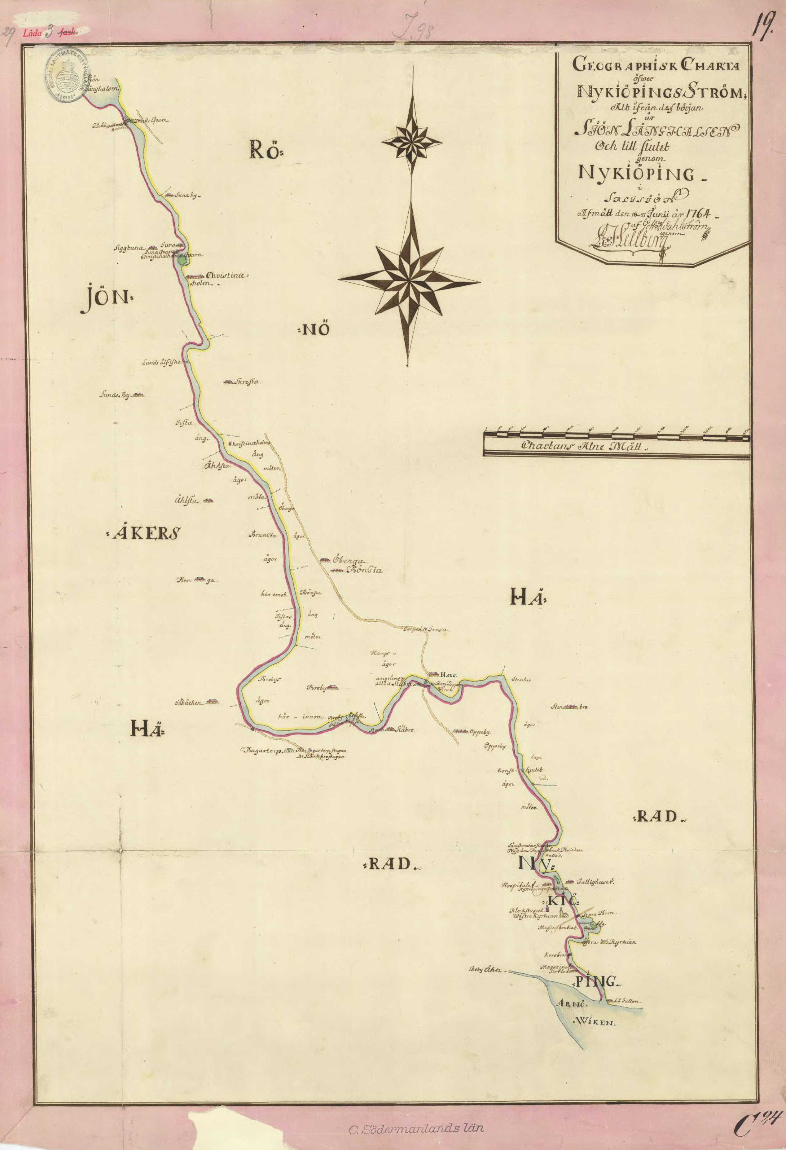 Karta över Nyköpingsån (Nyköping ström) från sjön Långhalsen till Östersjön.